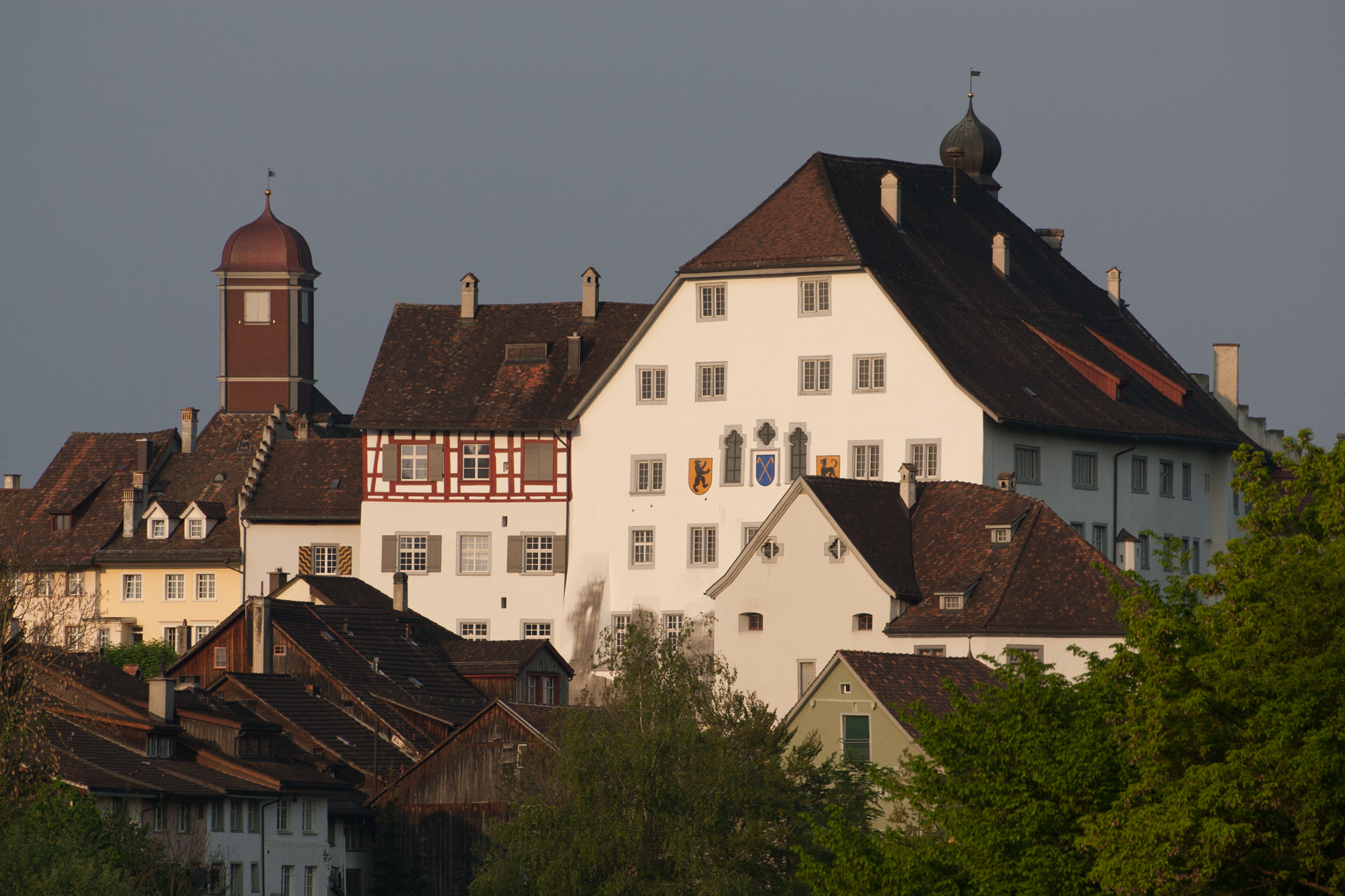 Ostseite des Hofs in Wil (SG)